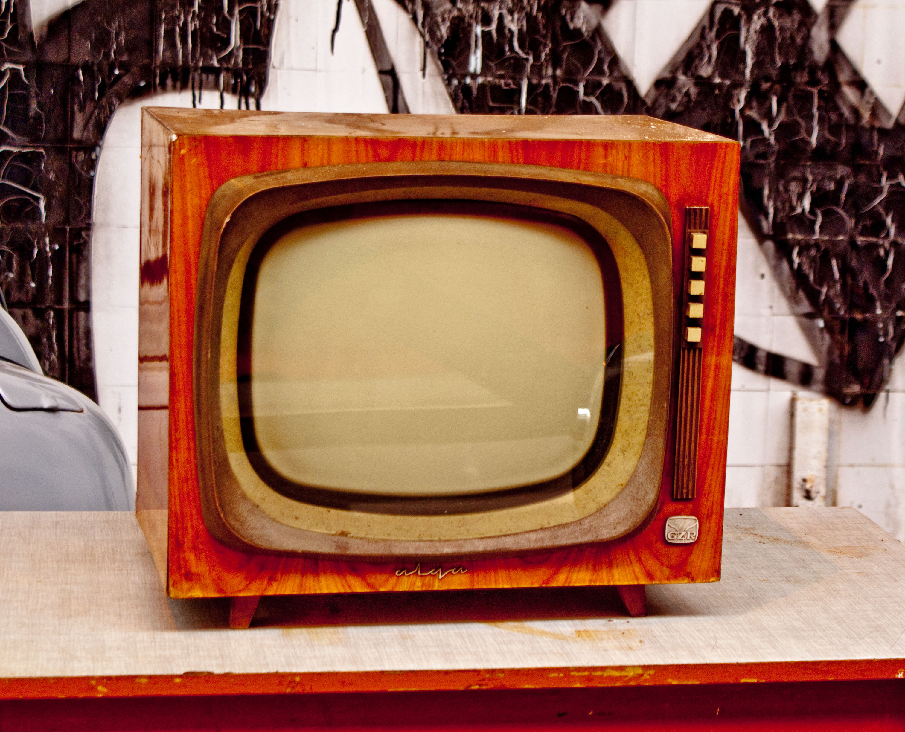 Telewizor CRT Alga produkowany przez Gdańskie Zakłady Radiowe. Wystawa Prywatnego Muzeum Motoryzacji i Techniki w wytwórni Wódek Koneser.